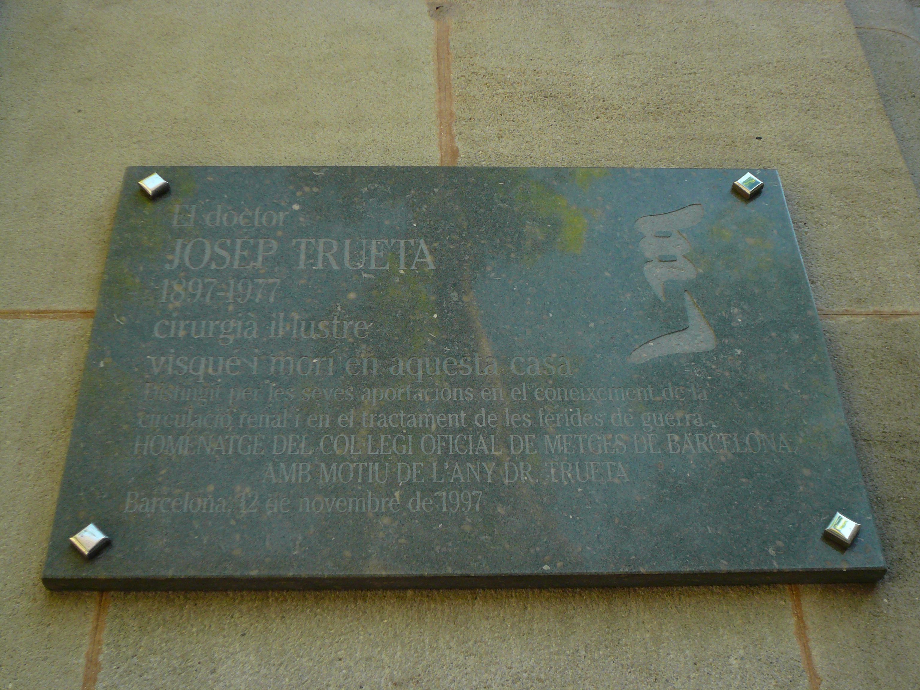 Josep Trueta. Rambla Catalunya, 74 (Barcelona). Material: granit gris. El doctor / JOSEP TRUETA / 1897-1977 / cirurgià il·lustre / visqué i morí en aquesta casa / Distingit per les seves aportacions en el coneixement de la / circulació renal i en el tractament de les ferides de guerra. / HOMENATGE DEL COL·LEGI OFICIAL DE / METGES DE BARCELONA / AMB MOTIU DE L’ANY DR. TRUETA / Barcelona, 12 de novembre de 1997. 1997. 88″ N, 2° 09′ 44.21″ E